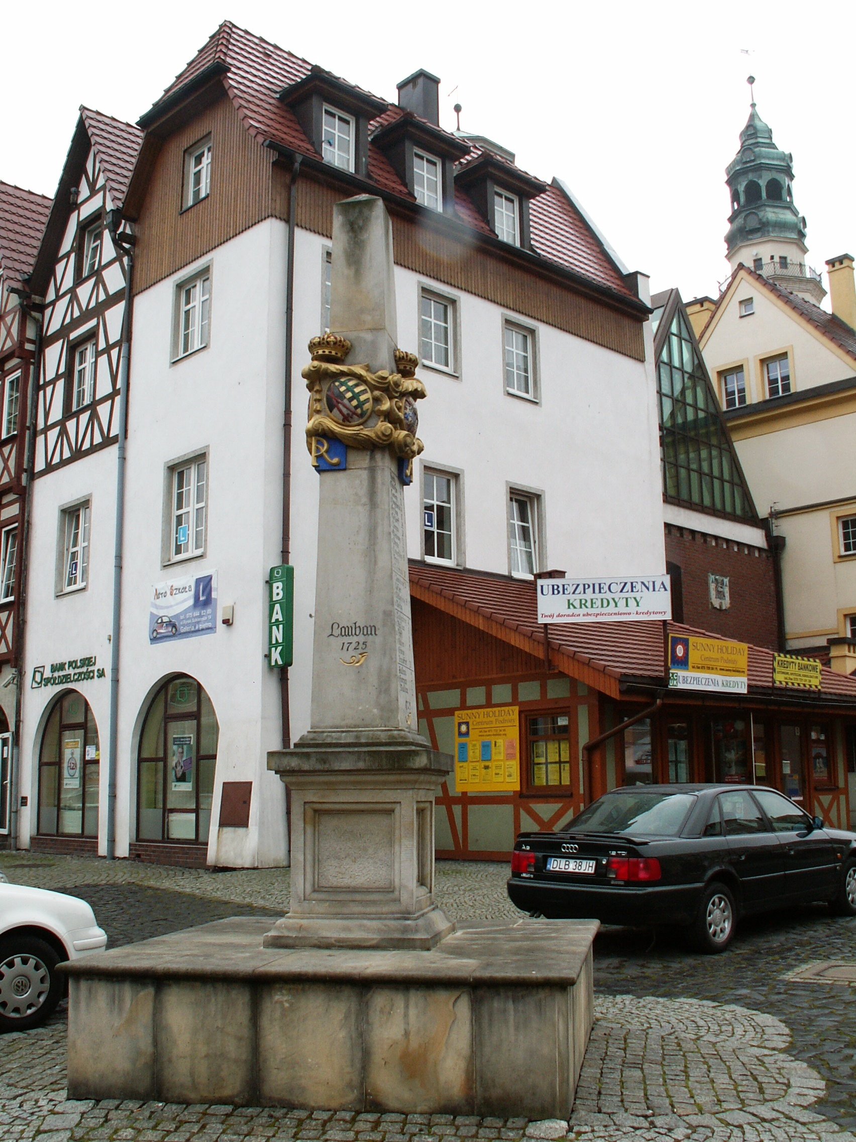 Distanzsäule